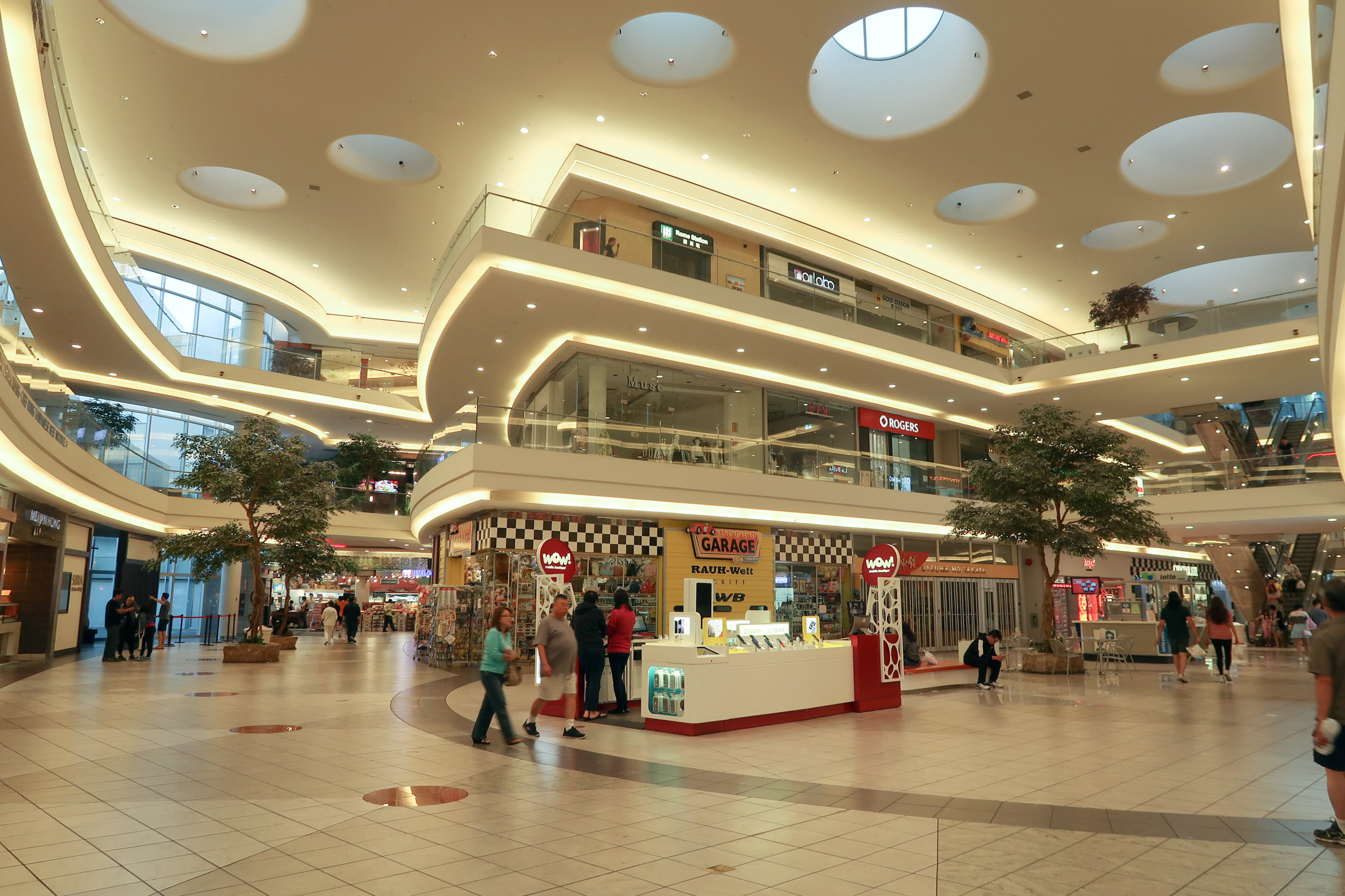 Aberdeen Centre Interior